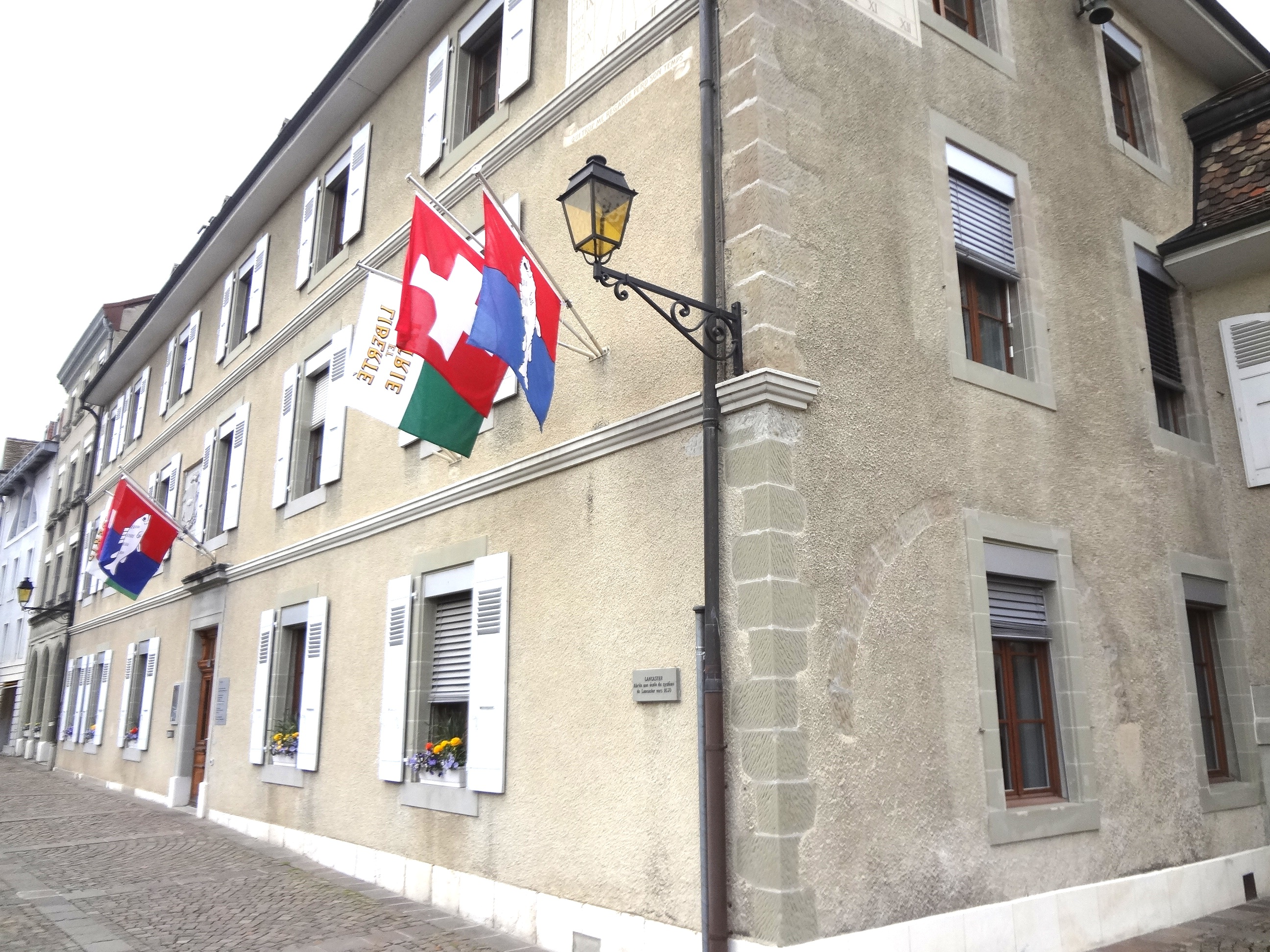 Mairie de Nyon. Ancienne "Ecole Lancaster".